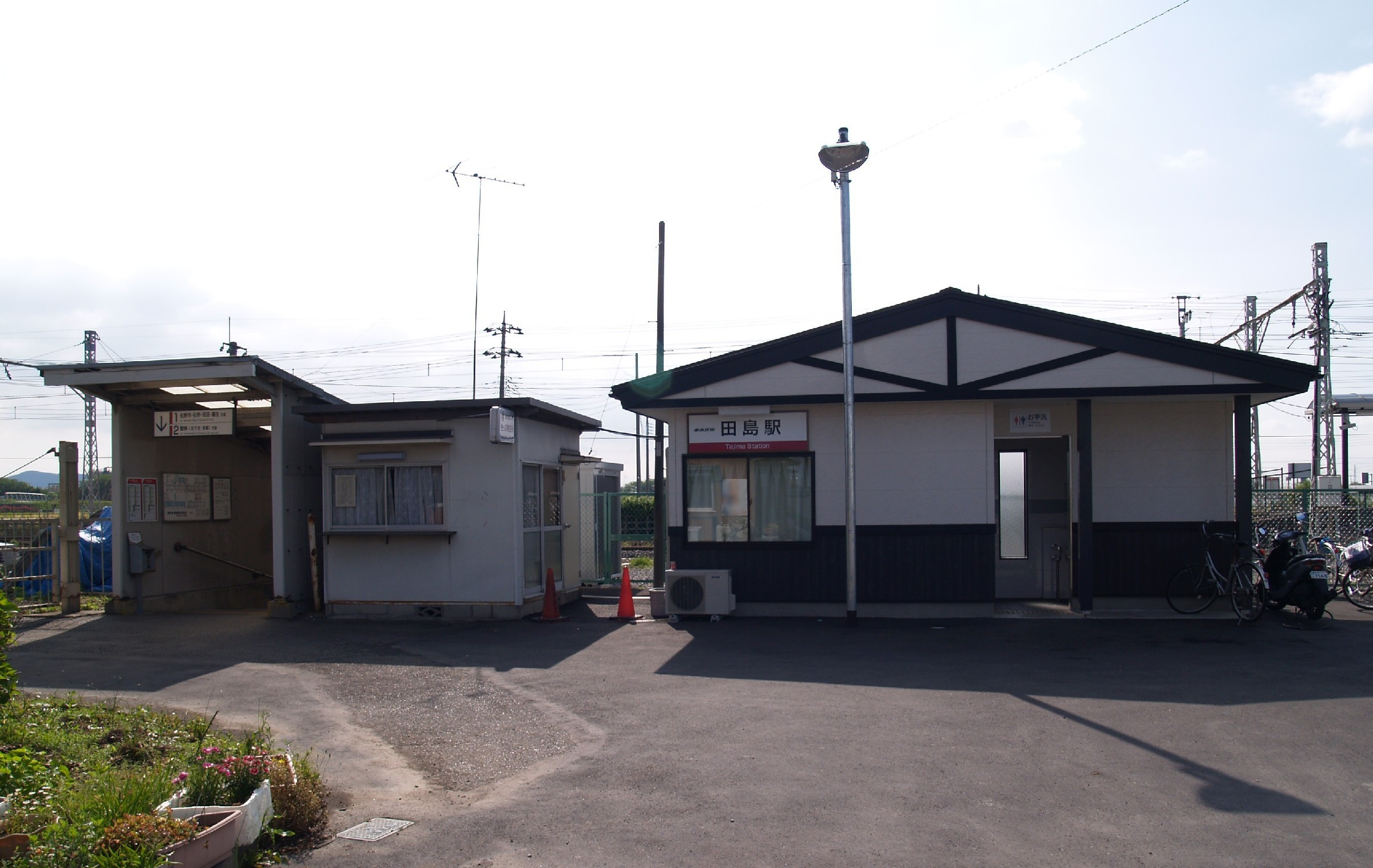 田島駅